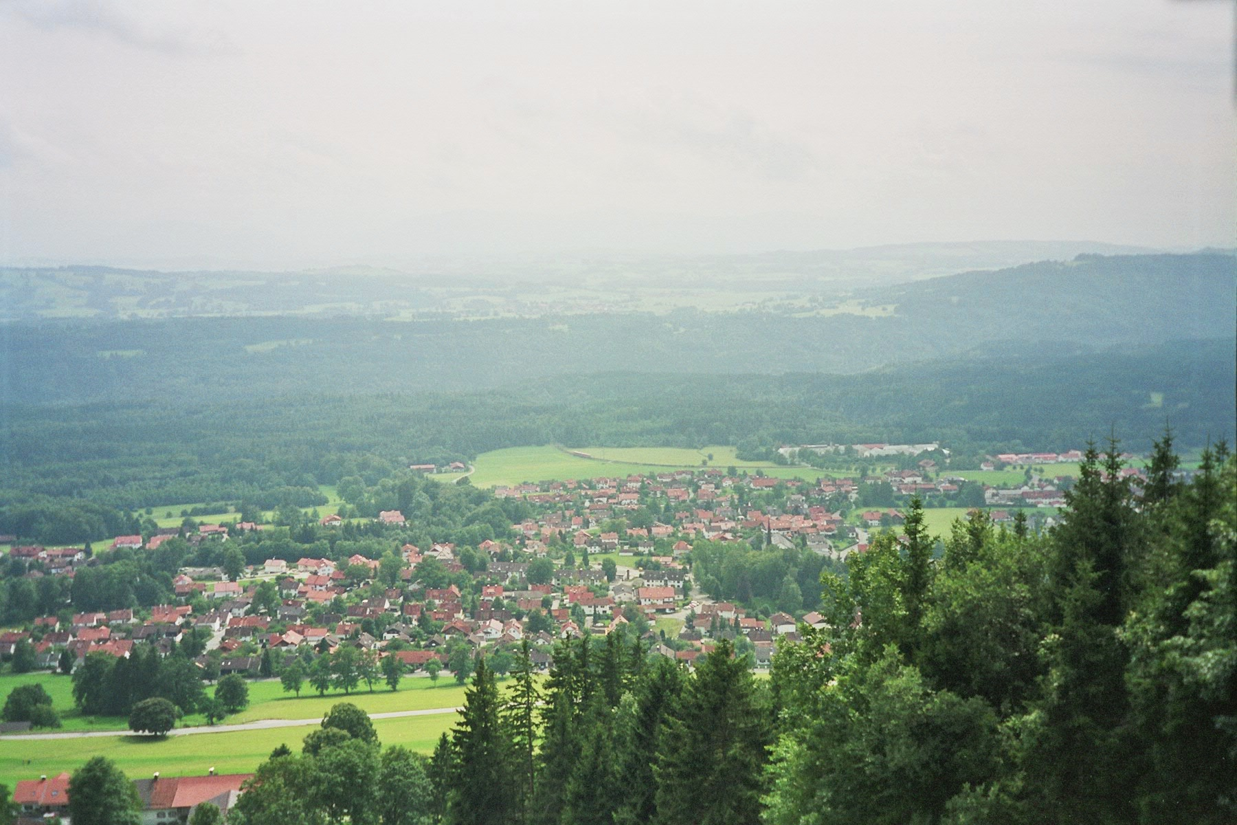 Blick auf Hohenpeißenberg von der Wallfahrtskirche auf dem Peißenberg aus. Autor: Benutzer:Jan G